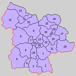 兵庫県氷上郡の町村制時点の町村。